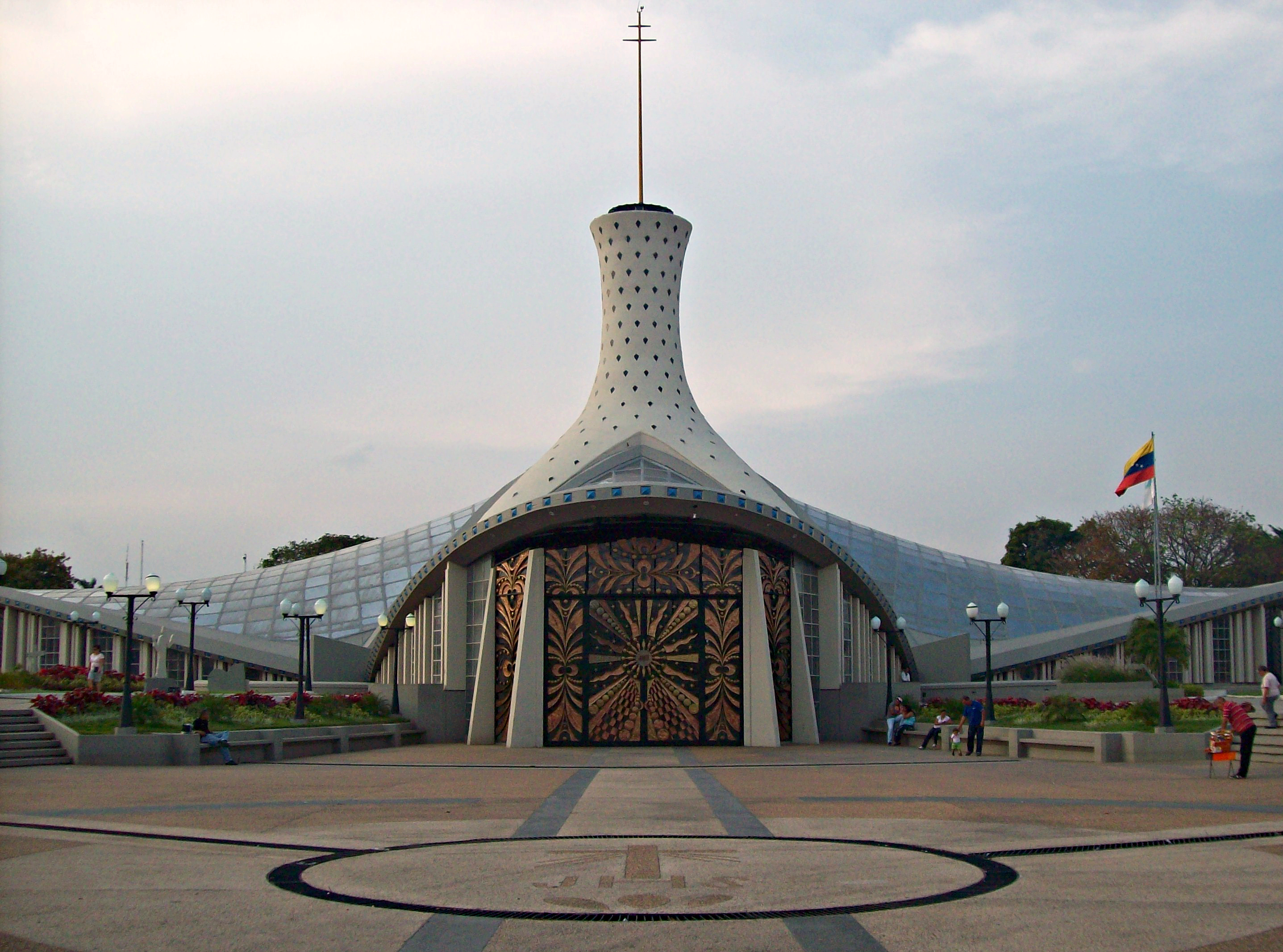 Catedral Metropolitana de la ciudad de Barquisimeto sede de la arquidiocesis de dicha ciudad.